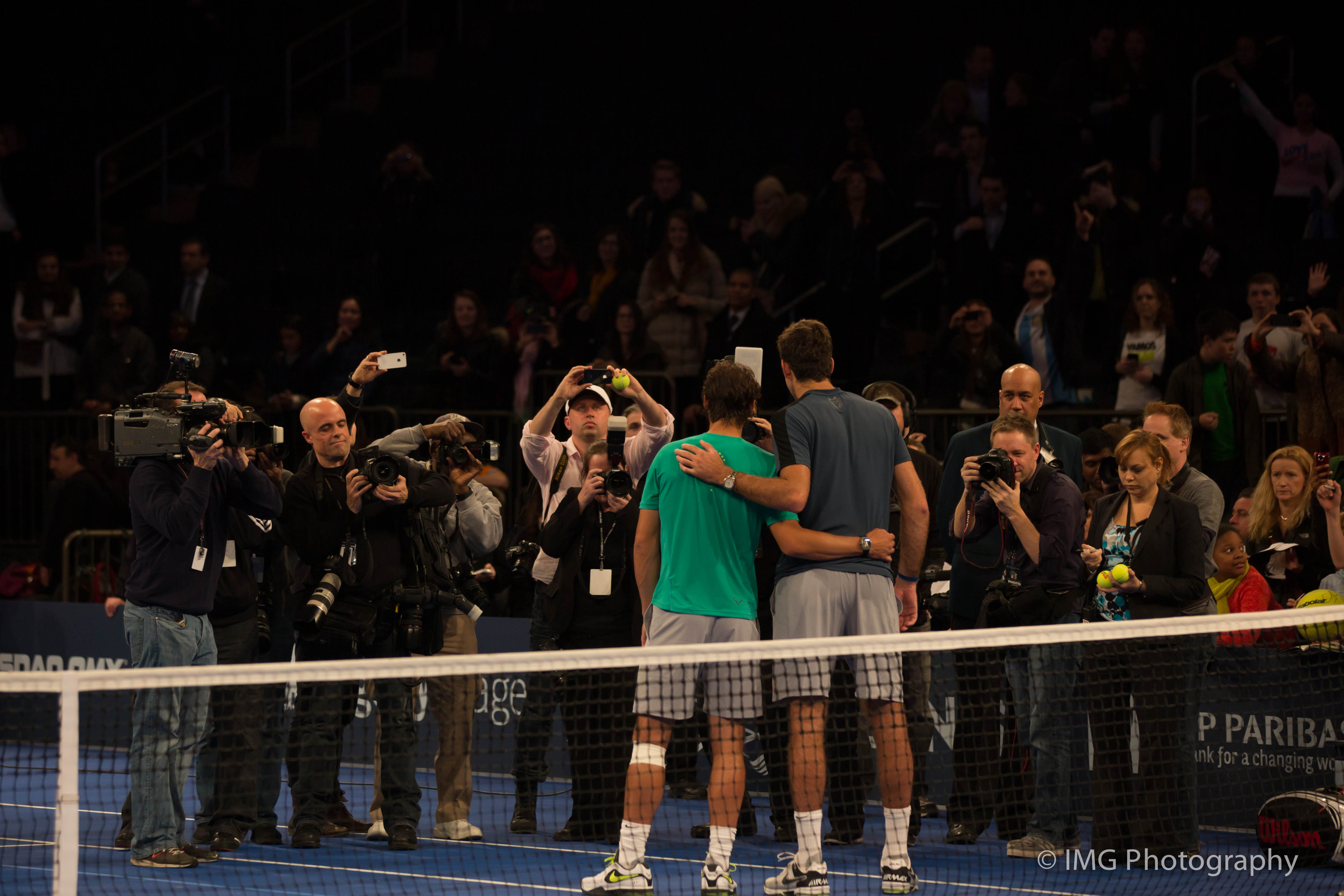 2013 BNP Paribas Showdown - Rafael Nadal vs Juan Martín del Potro